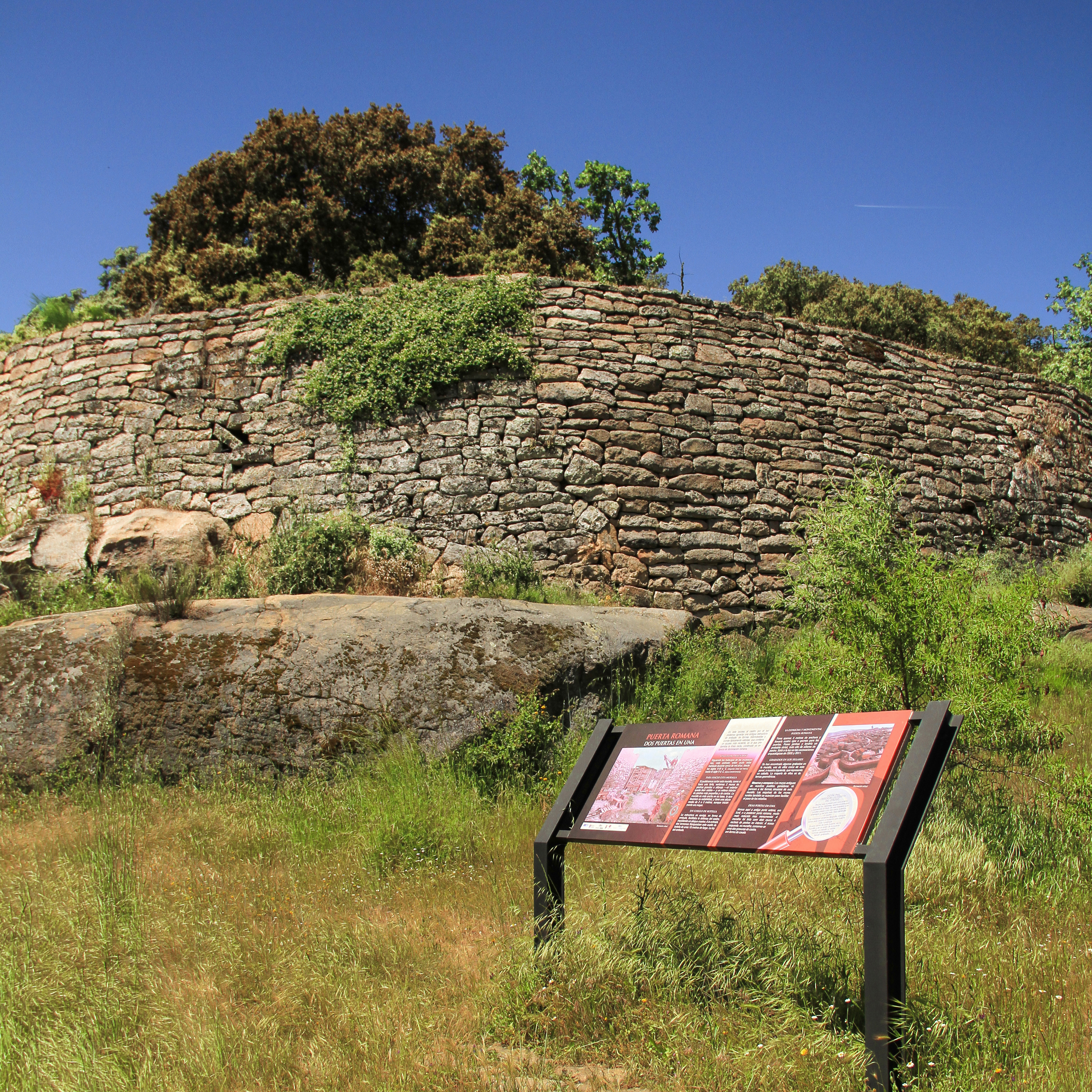 Muralla del castro vetón de Las Merchanas, en Lumbrales, Castilla y León, España.